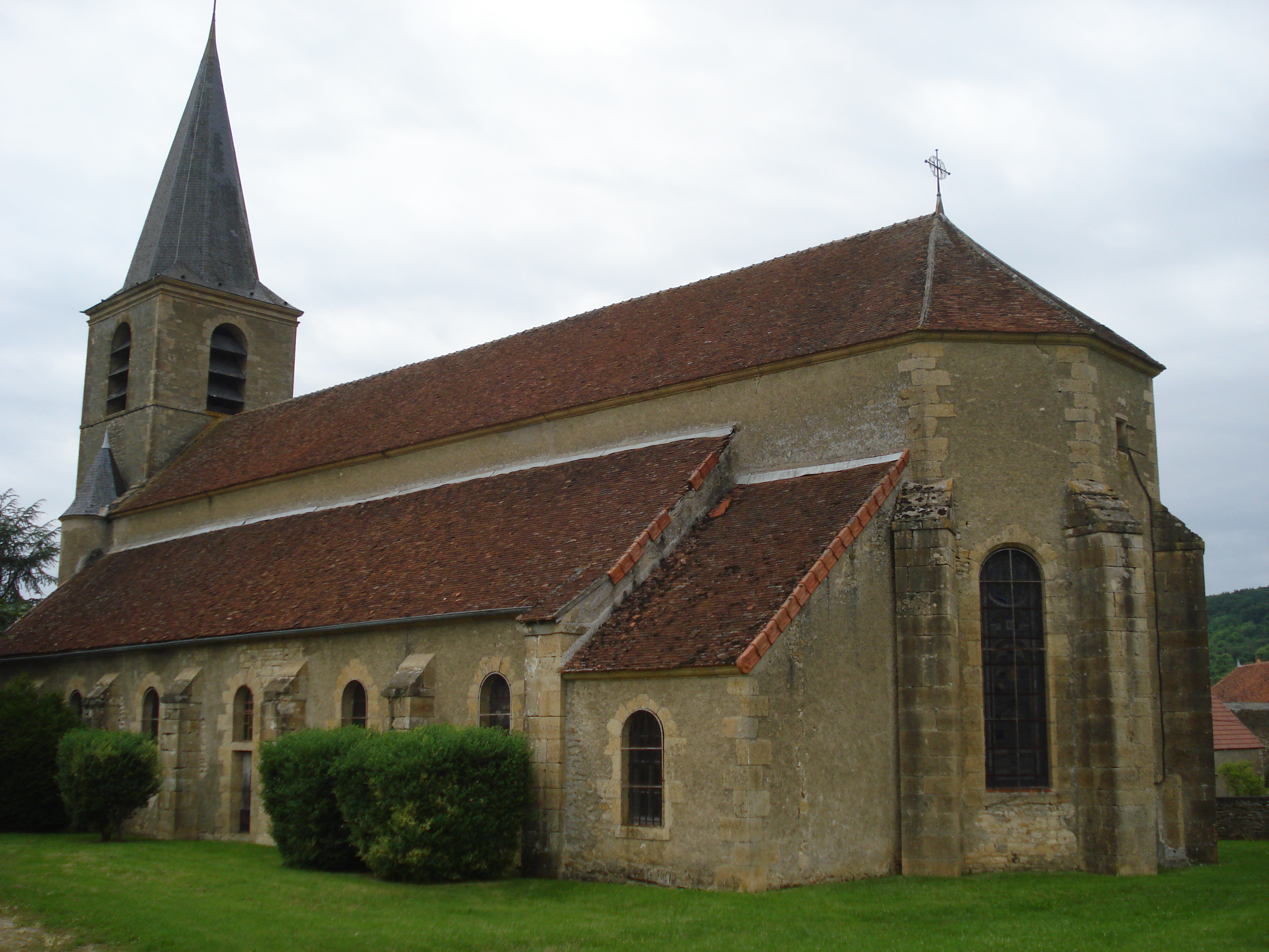 Châteauneuf-Val-de-Bargis (Nièvre, Fr), church